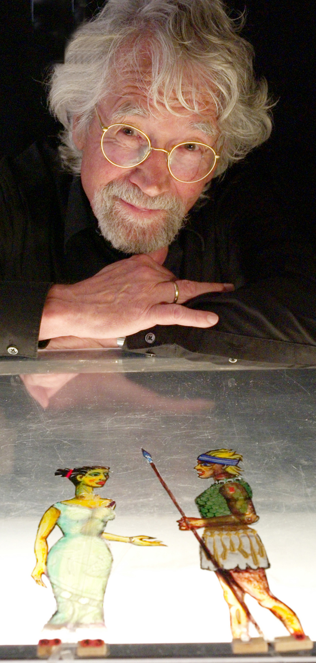 Rainer Reusch an seinem Sandtisch